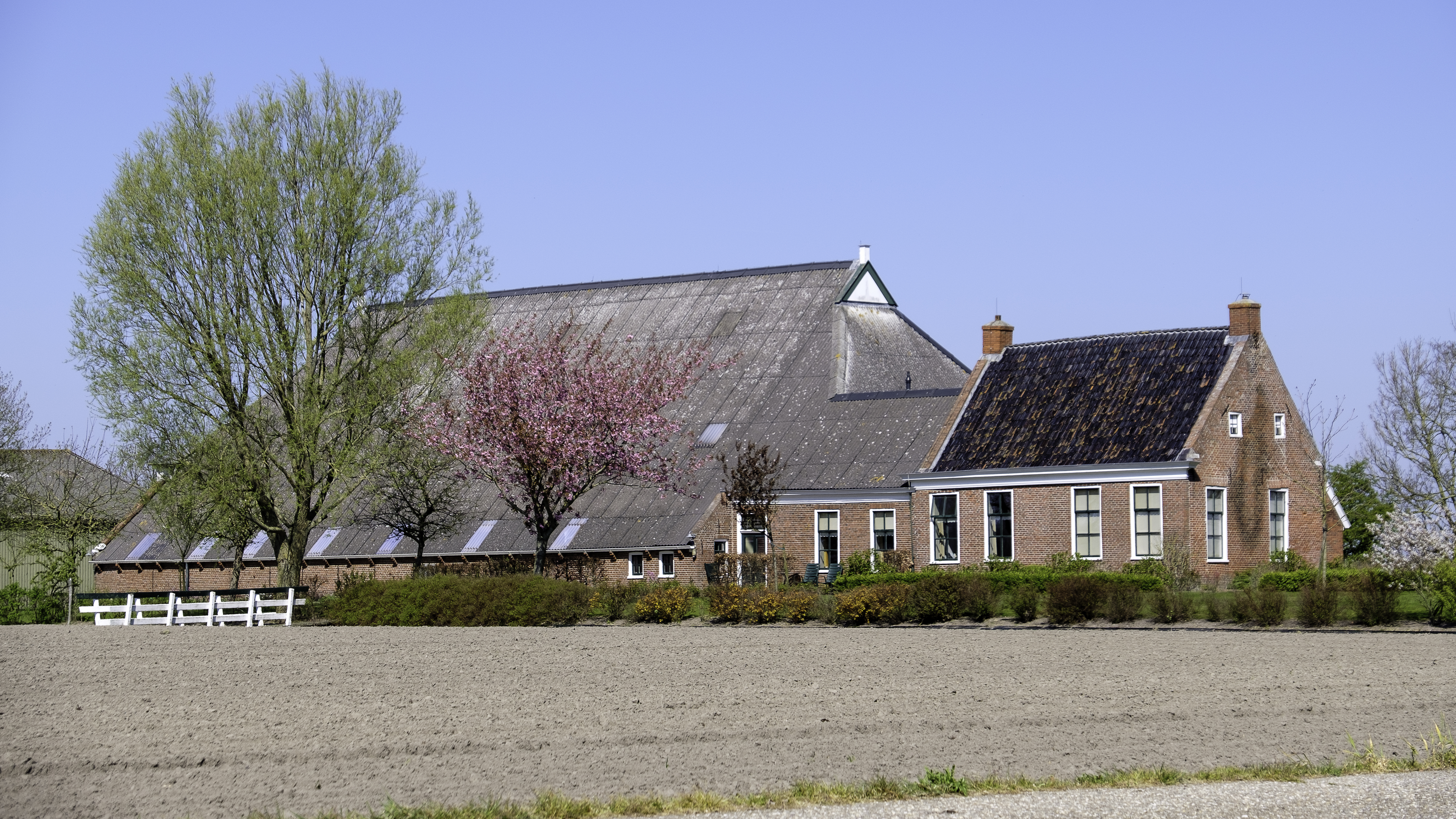 Boerderij Bolt in het streekje Oudedijk onder Pieterburen